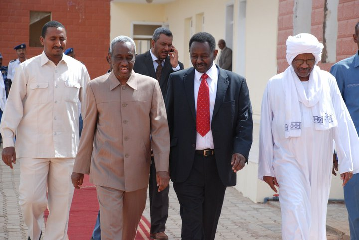 النائب الاول لرئيس الجمهوريه علي عثمان محمد طه ورئيس الجامعه بوفيسور بكري عثمان سعيد في زياره للجامعه